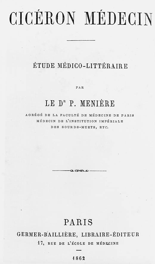 Cicéron médicin: étude médico-litteraire